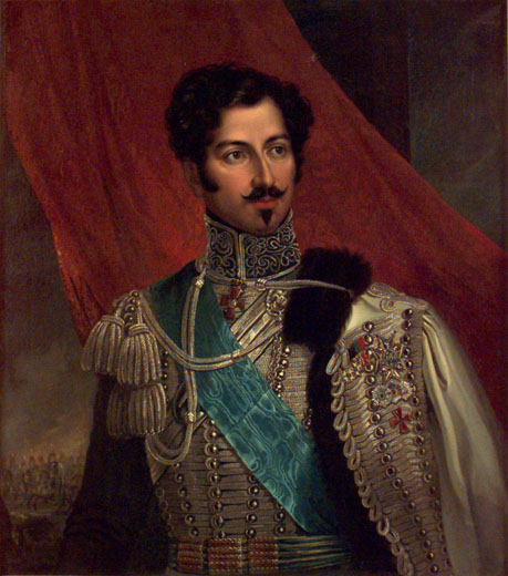 Oscar I av Sverige